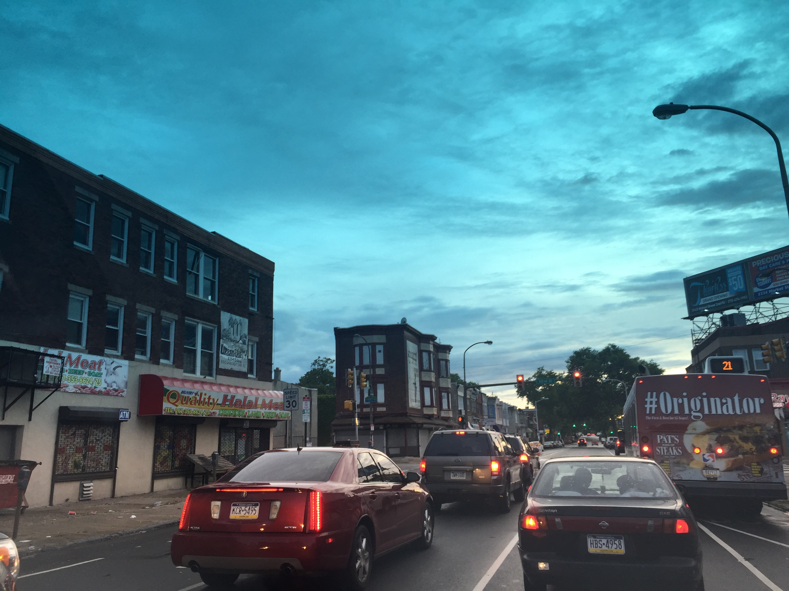 Dunlap neighborhood